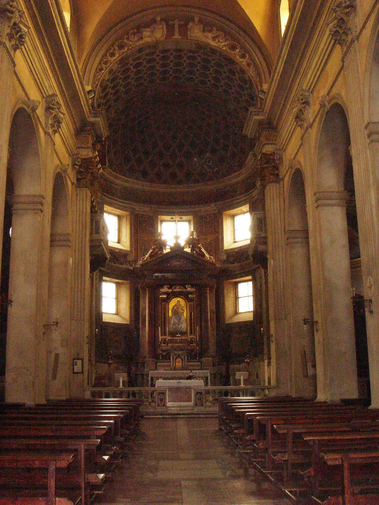 Roma, Santa Maria della Consolazione: interno